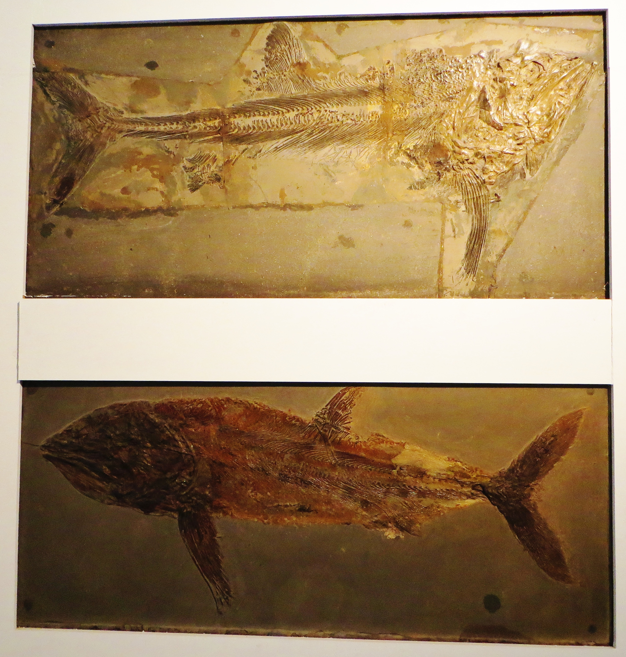 Fossil of Pachycormus, an extinct fish - Took the picture at Museum of Paleontology, Tuebingen